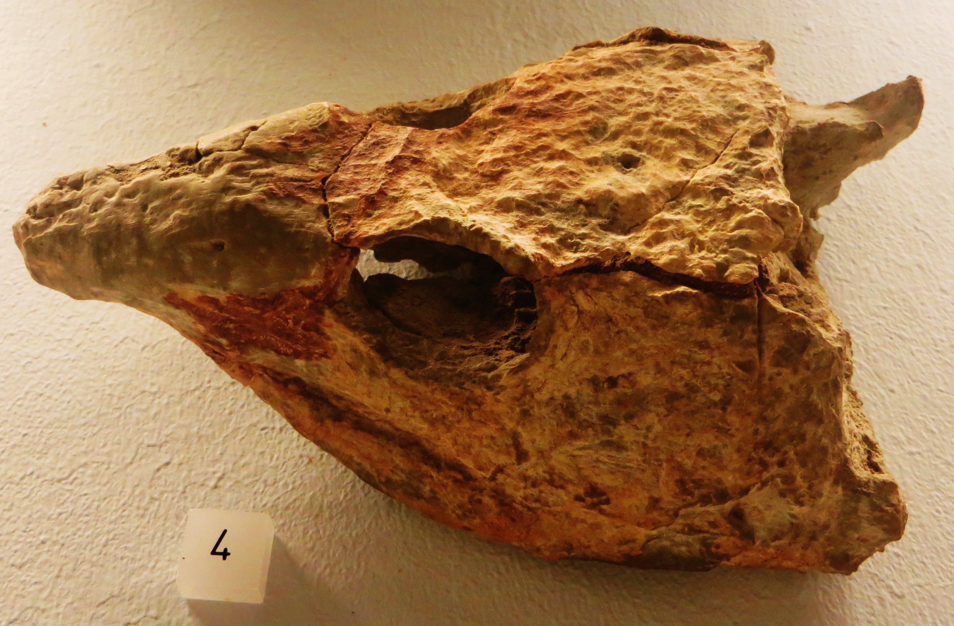 Fossil of Labidosaurus, an extinct reptile- Took the picture at Museum of Paleontology, Tuebingen